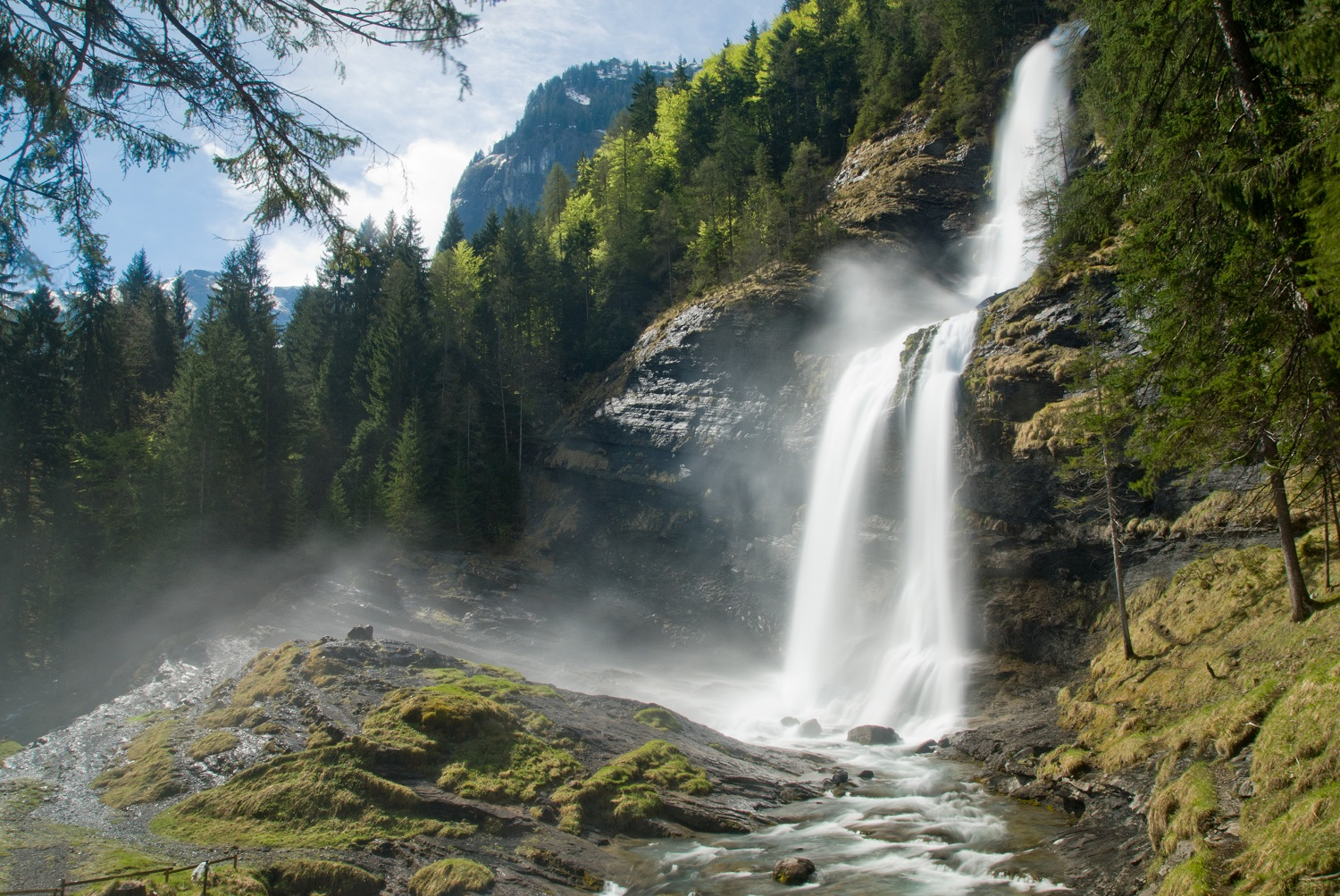 Appelée aussi "La Reine des Alpes", la cascade du Rouget est la plus prestigieuse des cascades sizères. Formée de 2 ressauts, elle jaillit sur plus de quatre-vingt mètres de haut.